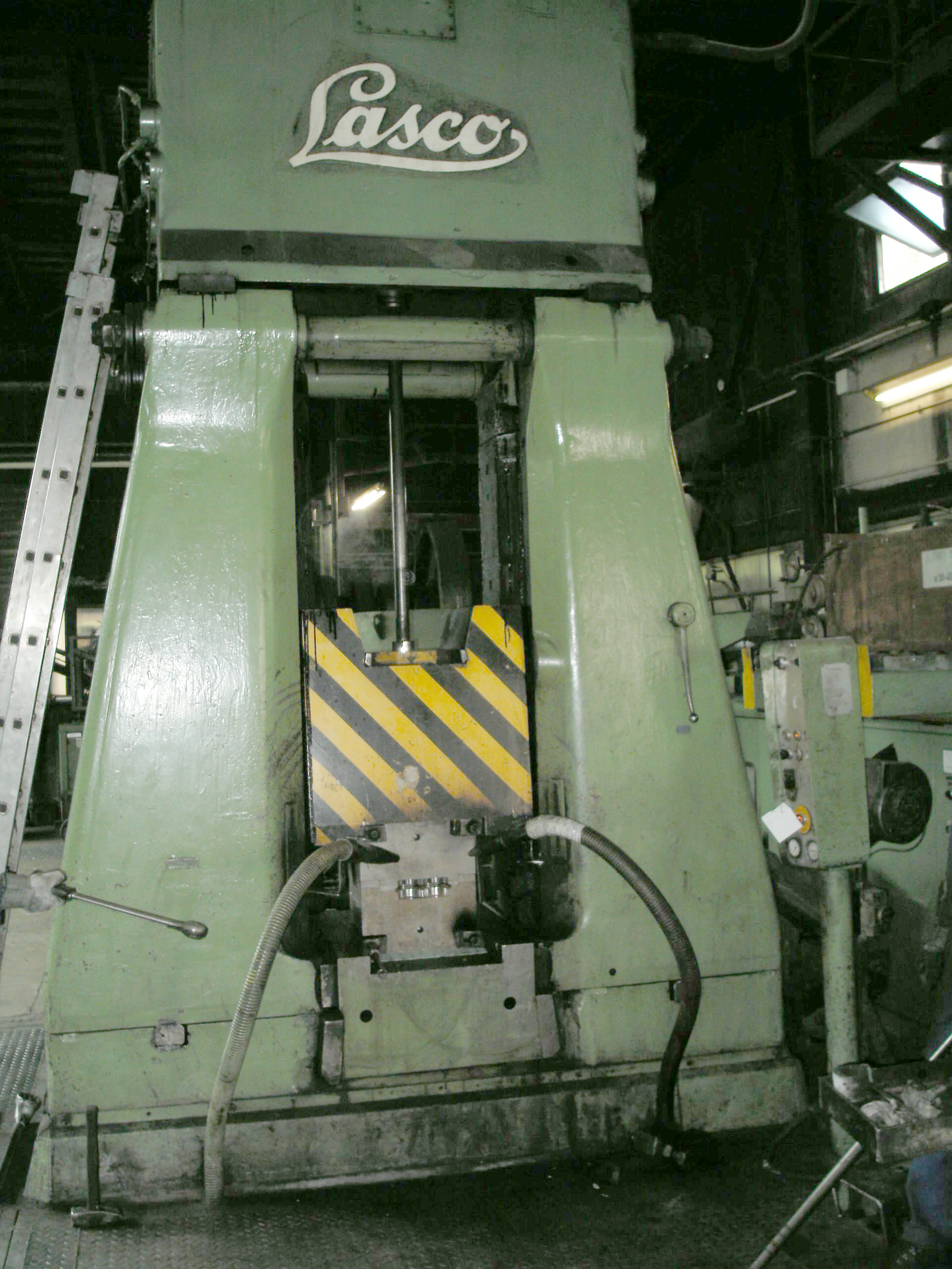 Lasco hydraulische Ogerdruckhammer 25kJ